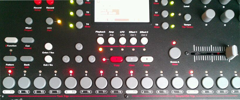 Bildausschnitt eines Elektron Octatrack Samplers mit Lauflichtprogrammierung.